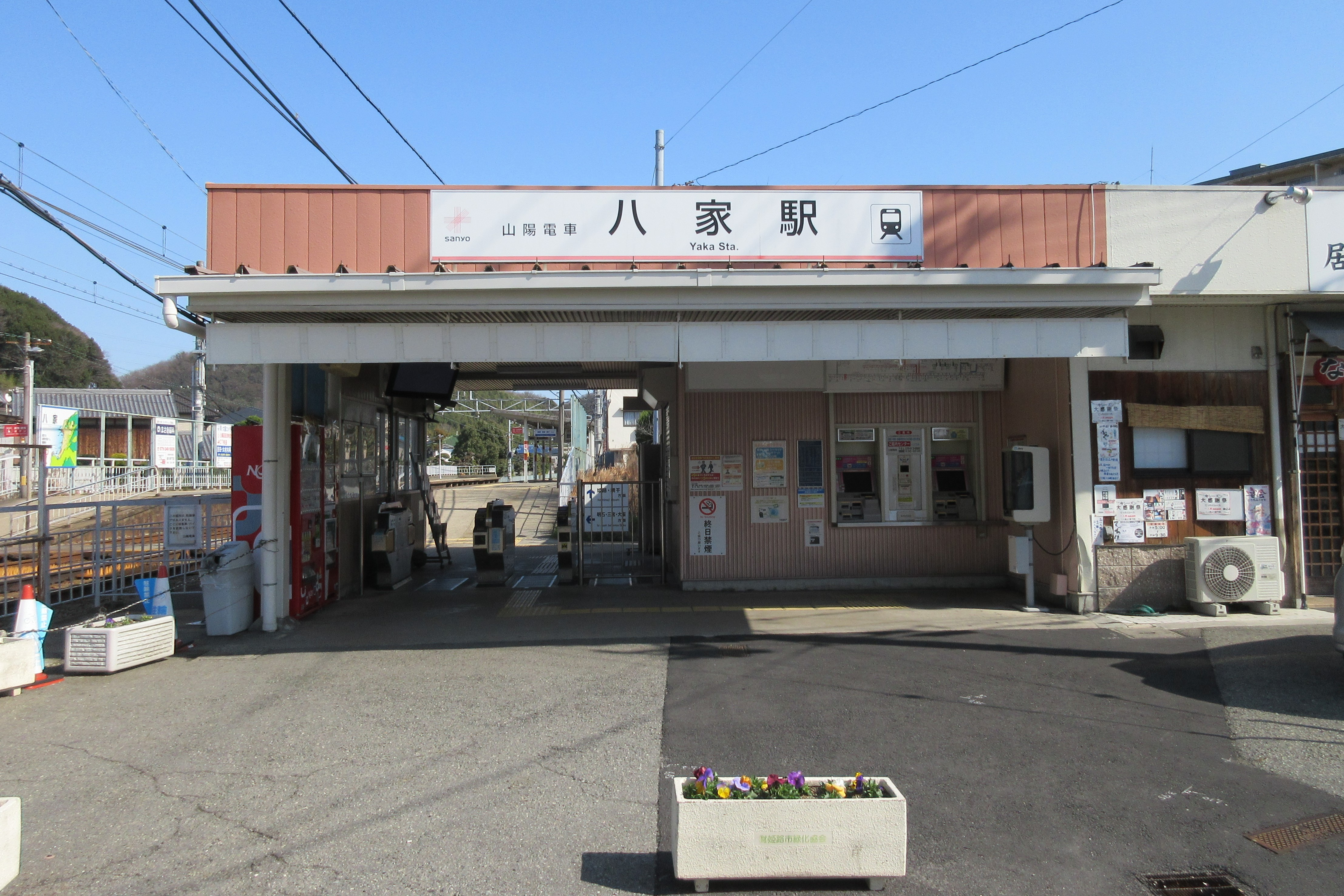 山陽電鉄八家駅